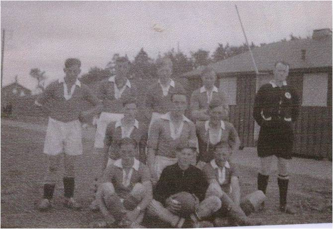 ØB Træhuset